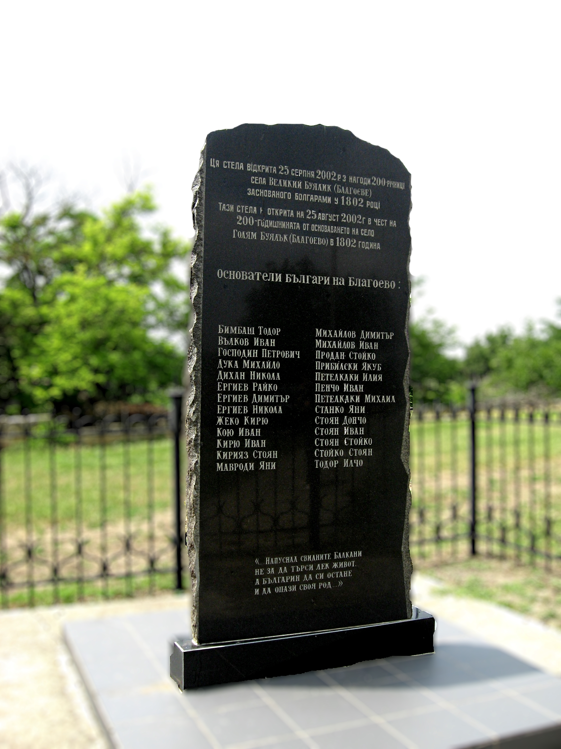 Встановлений у 2002 році в честь 200-ліття села.